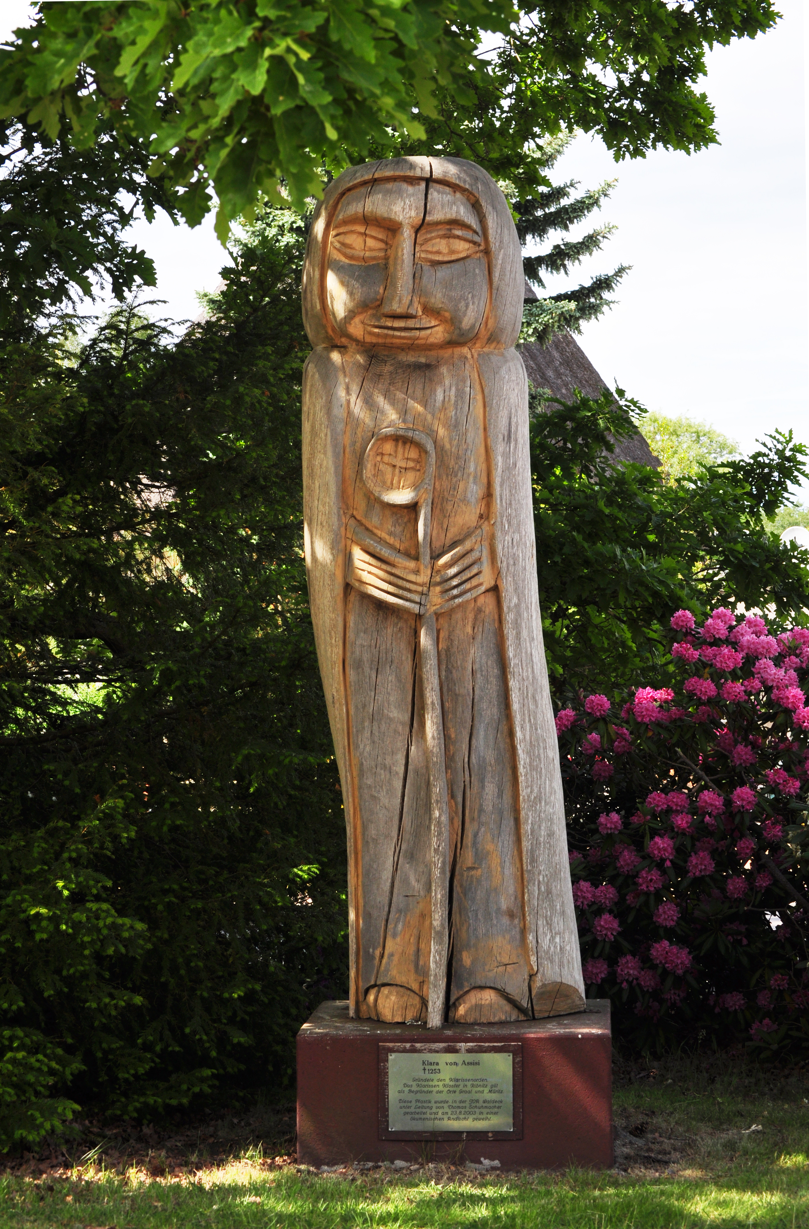 statue of Clare of Assisi in Graal-Müritz